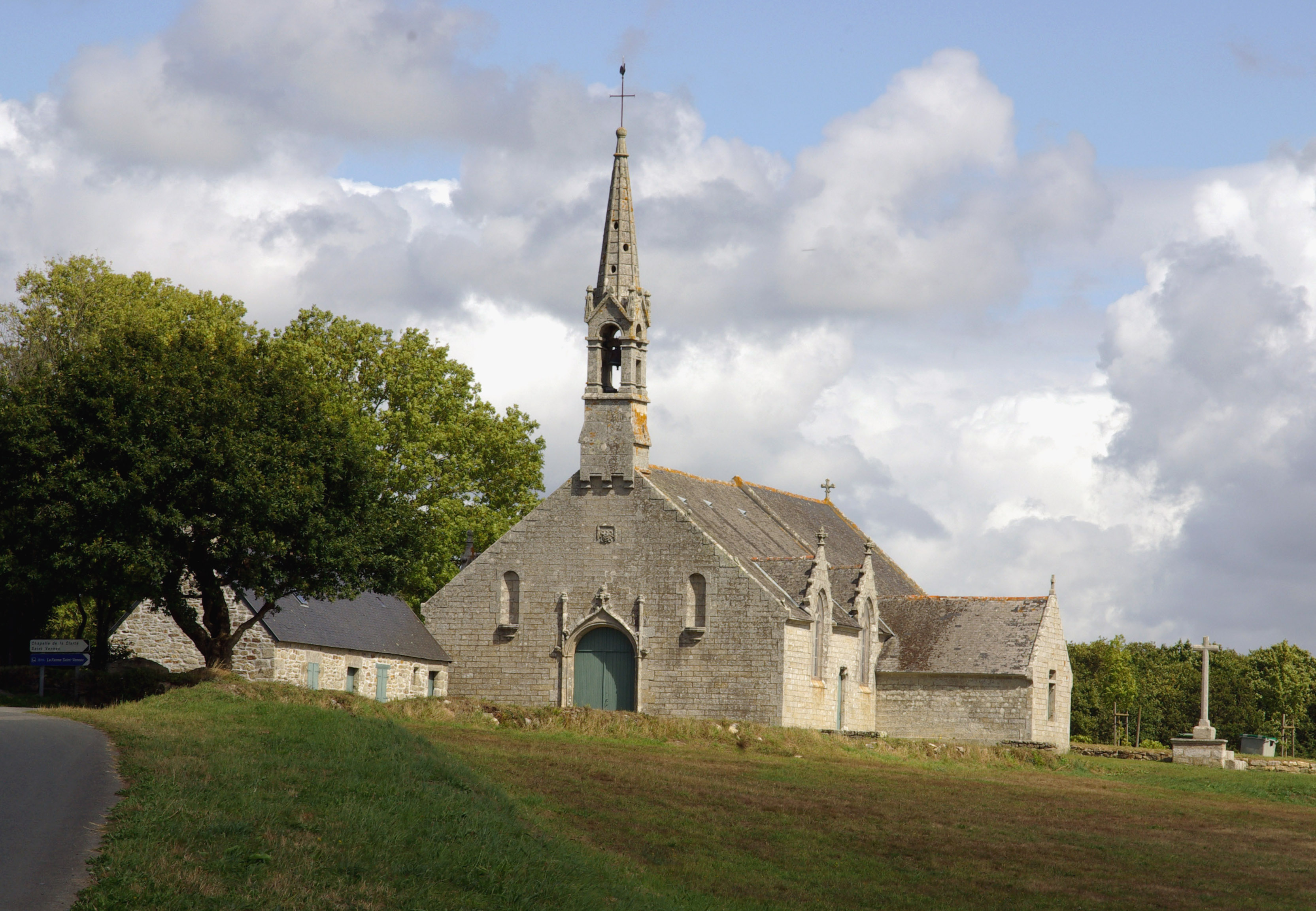 Chapelle Notre-Dame-de-la-Clarté (anciennement Saint-Vennec) en Combrit, Finistère, Bretagne, France